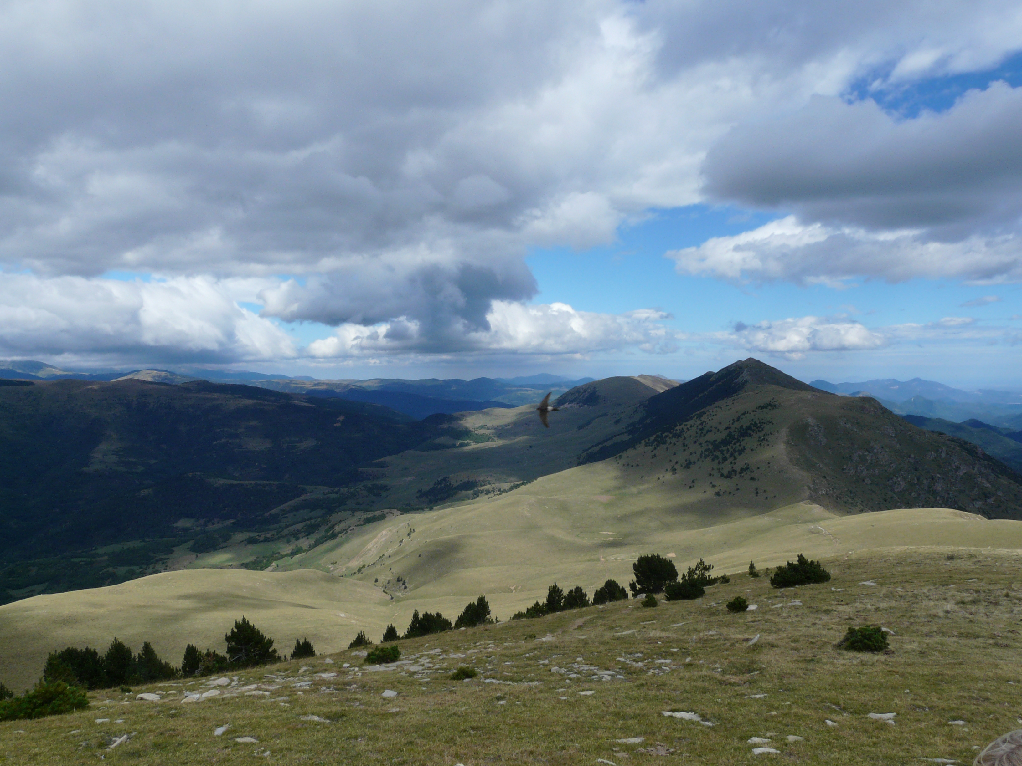 Serra Cavallera (Ripollès) (Ogassa, Pardines, Ribes de Freser i altres). This is a a photo of a natural area in Catalonia, Spain, with id: ES510174 Object location42° 16′ 48″ N, 2° 13′ 48″ E